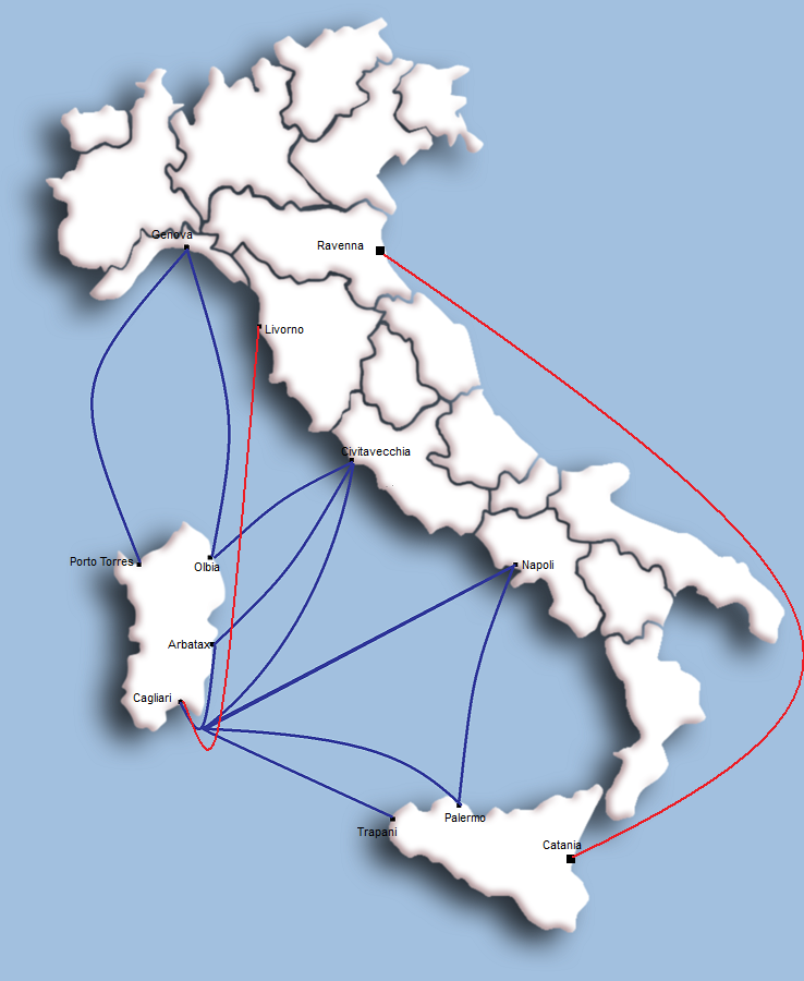 Linee navigazione